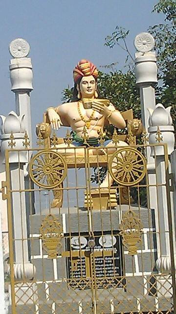 గౌతమీపుత్ర శాతకర్ణి స్తూపం,అమరావతి(మండలం) గుంటూరు(జిల్లా) ఆంధ్రప్రదేశ్(రాష్ట్రం) భారతదేశం